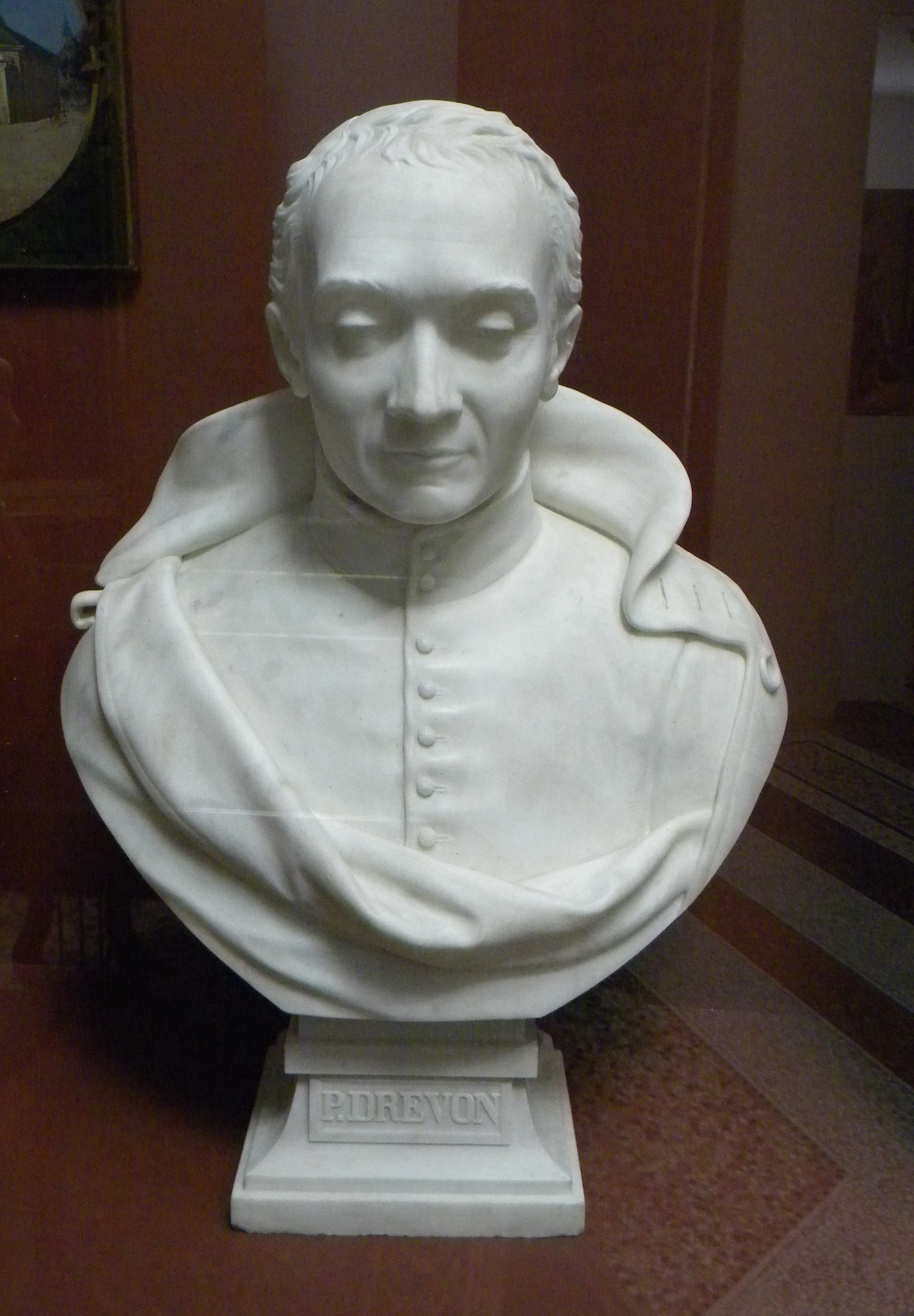 Père Victor Drevon, jésuite (1820-1880) musée du Hiéron, Paray-le-Monial